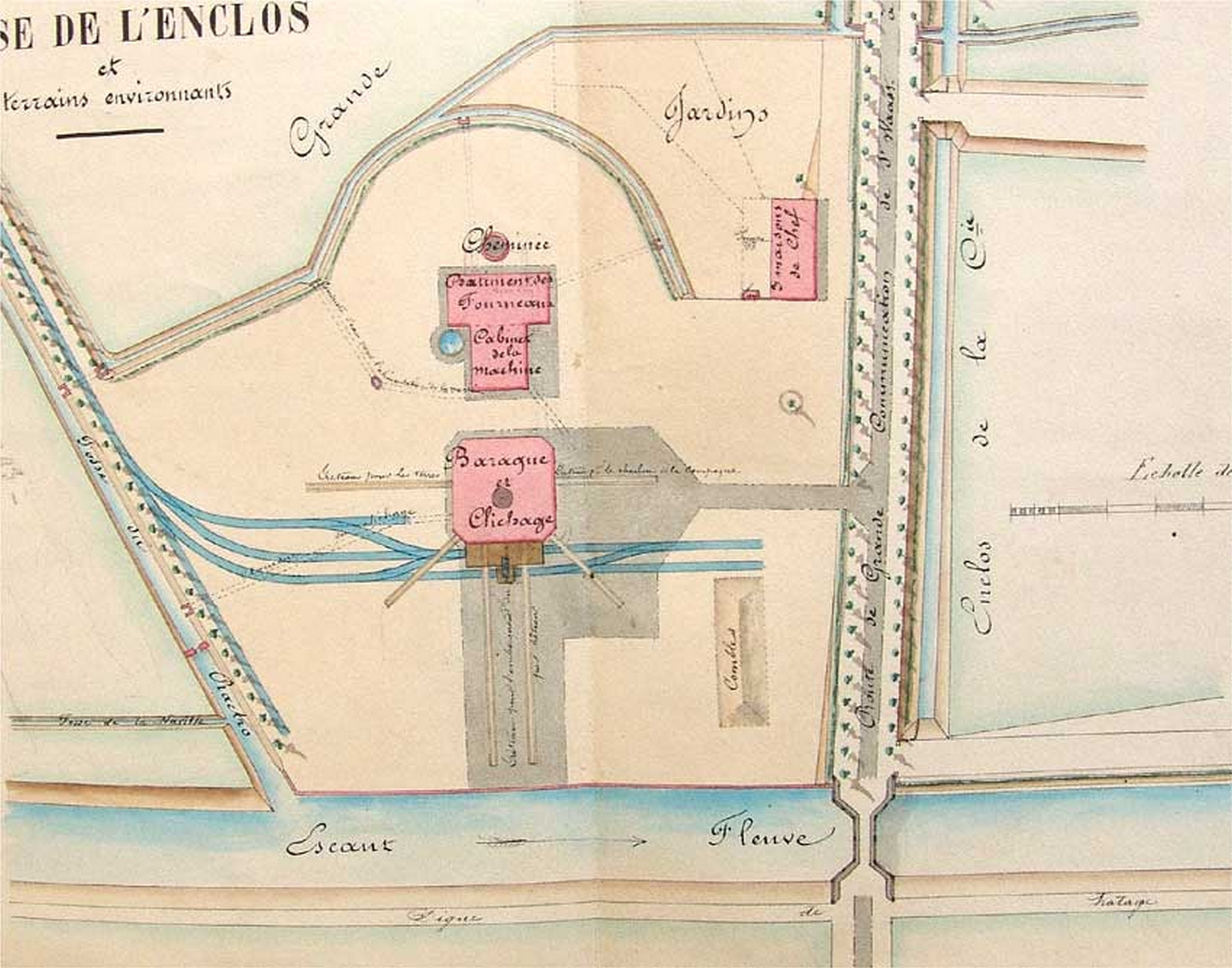 La fosse Enclos ou l'Enclos de la Compagnie des mines d'Anzin était un charbonnage constitué de deux puits situé à Denain, Nord, Nord-Pas-de-Calais, France.